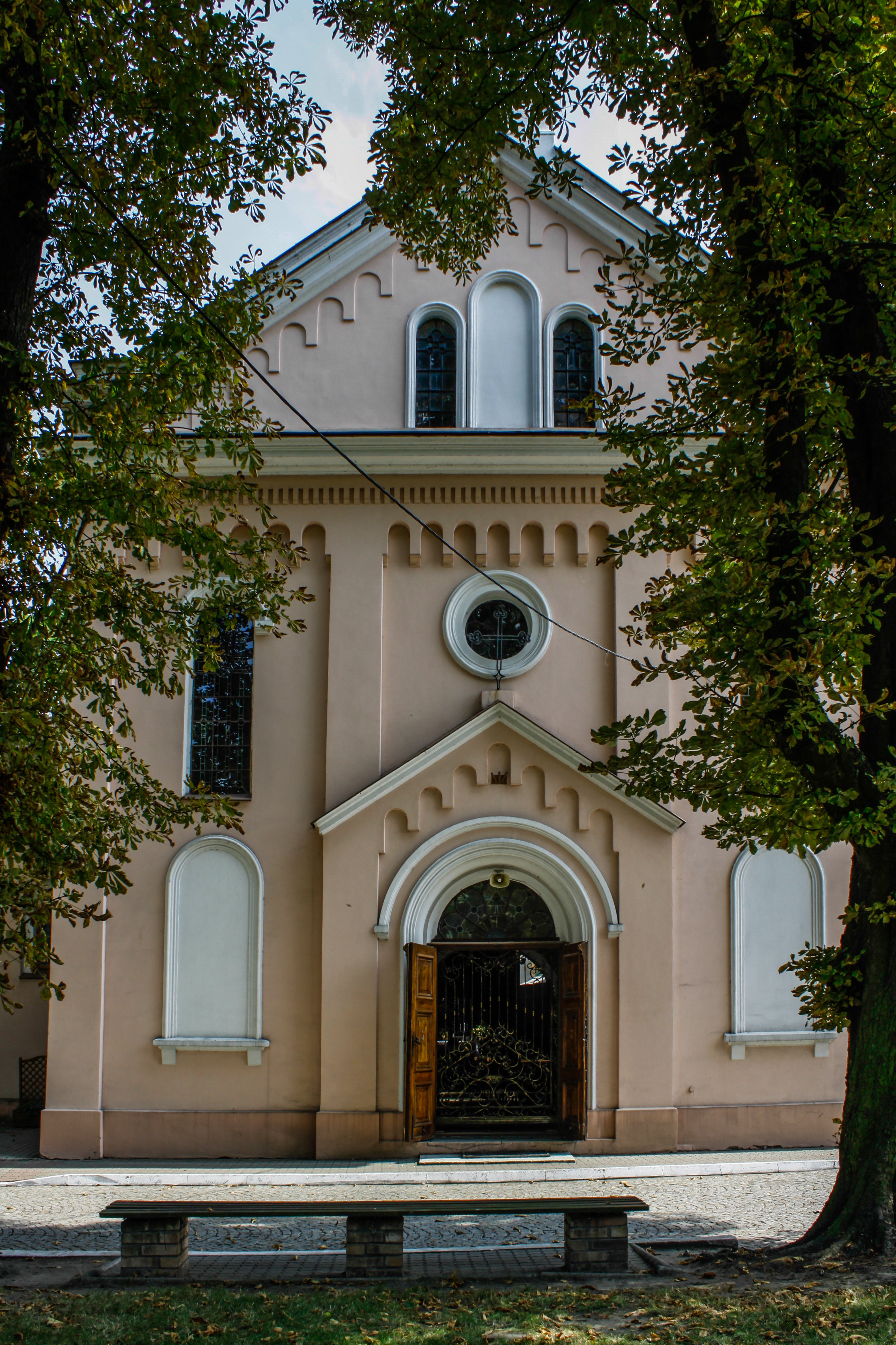 Dobrzyń nad Wisłą, kościół klasztorny franciszkanów, ob. par. p.w. Wniebowzięcia NMP, XV